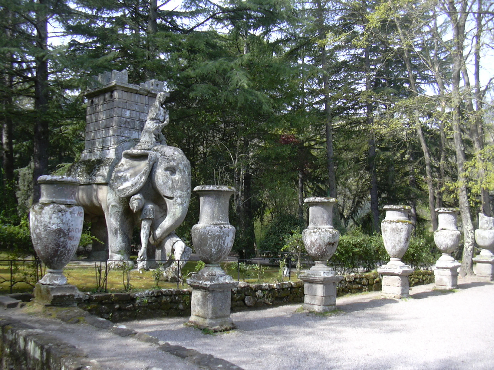 Sacro Bosco of Bomarzo, elephant